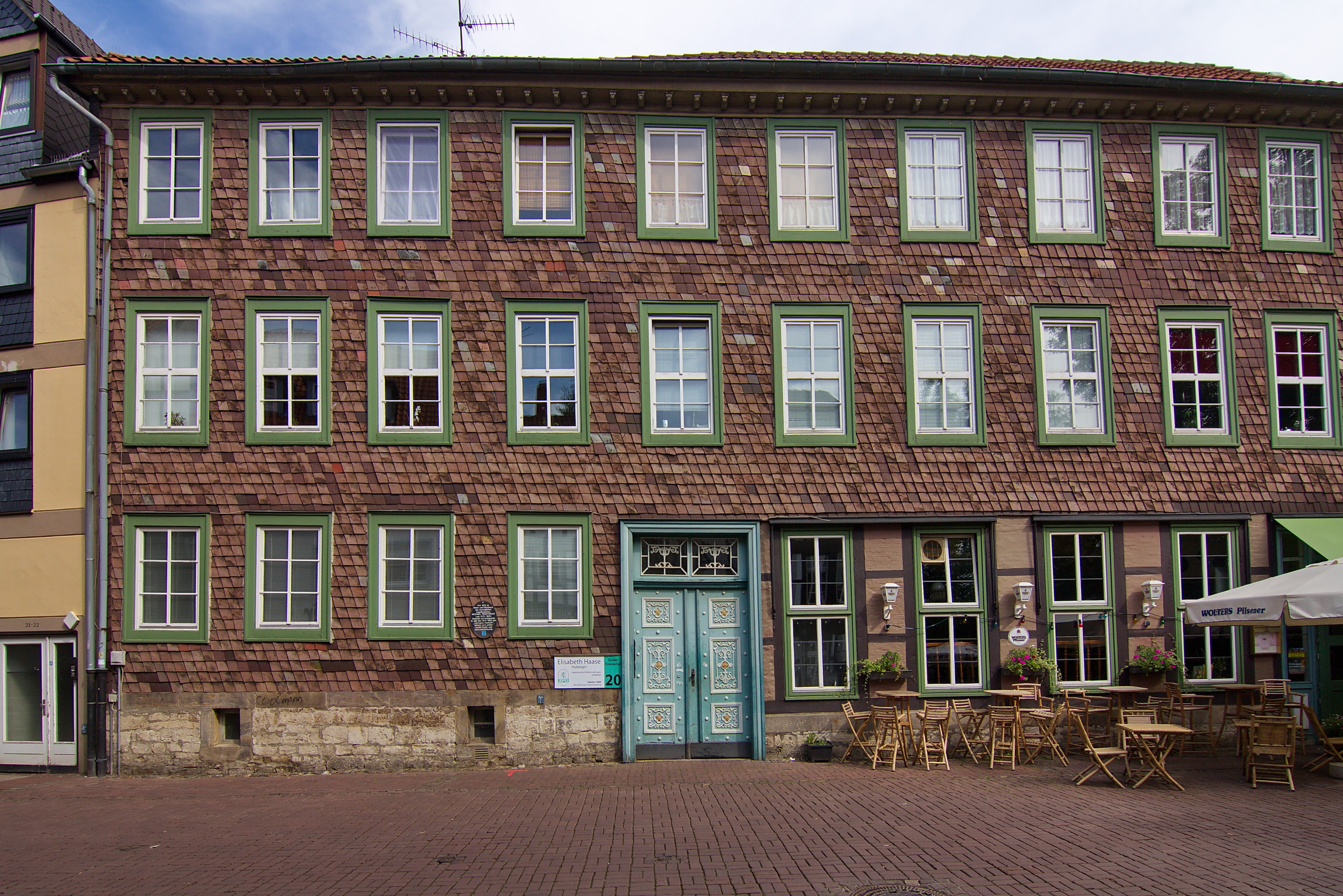 Ab 1612 das Wohn- und Brauhaus des herzoglichen Kapellmeisters Michael Praetorius in Wolfenbüttel, Niedersachsen, Deutschland.